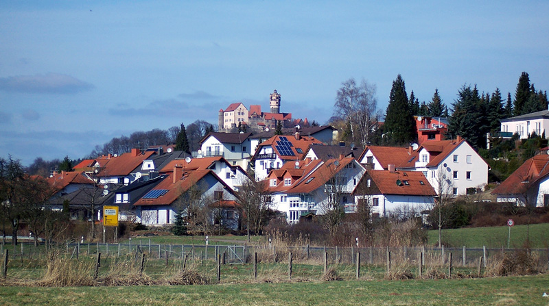 Das Bild zeigt das Neubaugebiet Wingertstraße